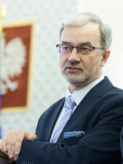 Dr Jerzy Kwieciński, inżynier, przedsiębiorca, urzędnik państwowy.